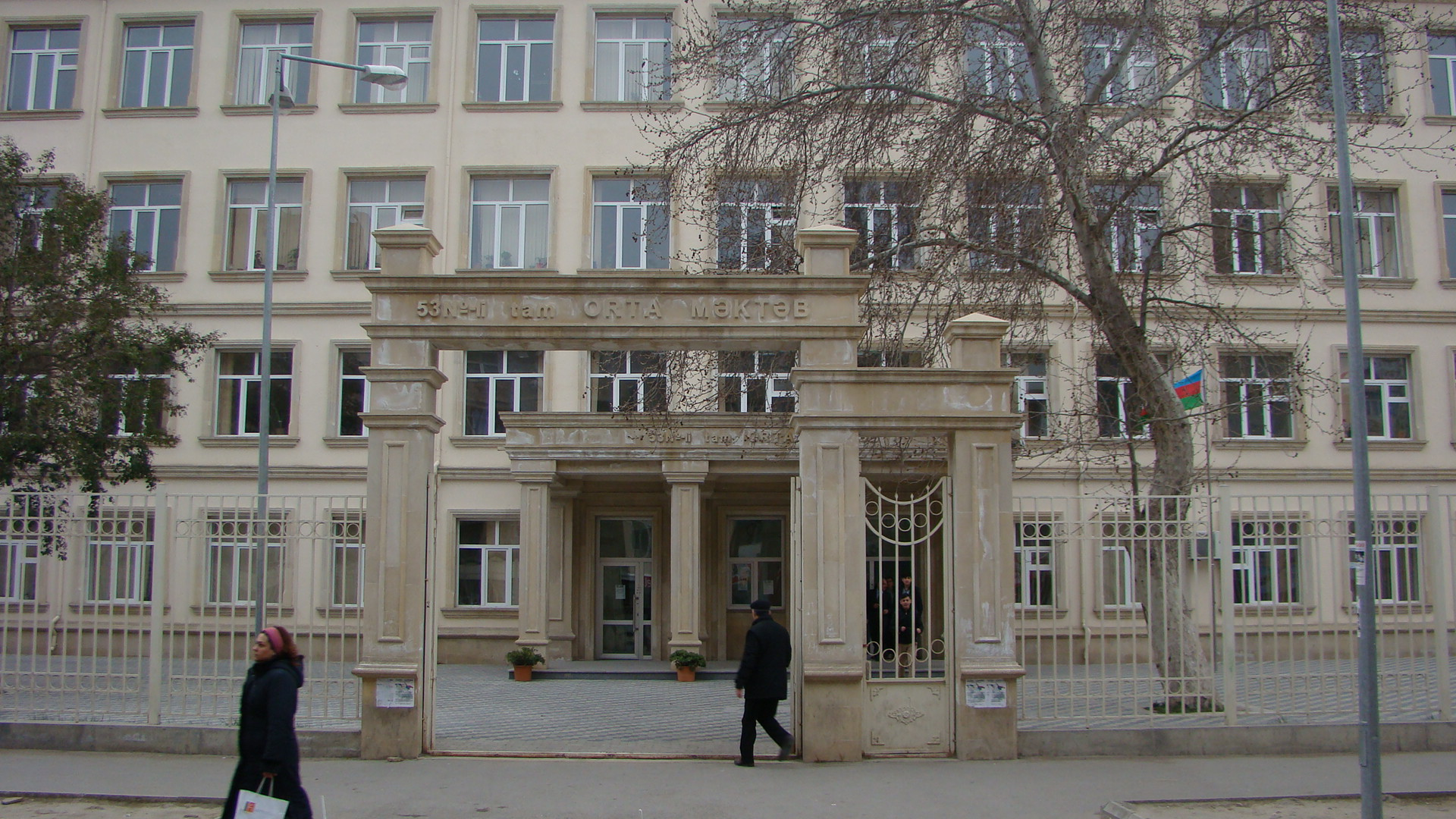 Bakı şəhəri Yasamal rayonunun Zahid Xəlilov küçəsindəki 53 saylı orta məktəb